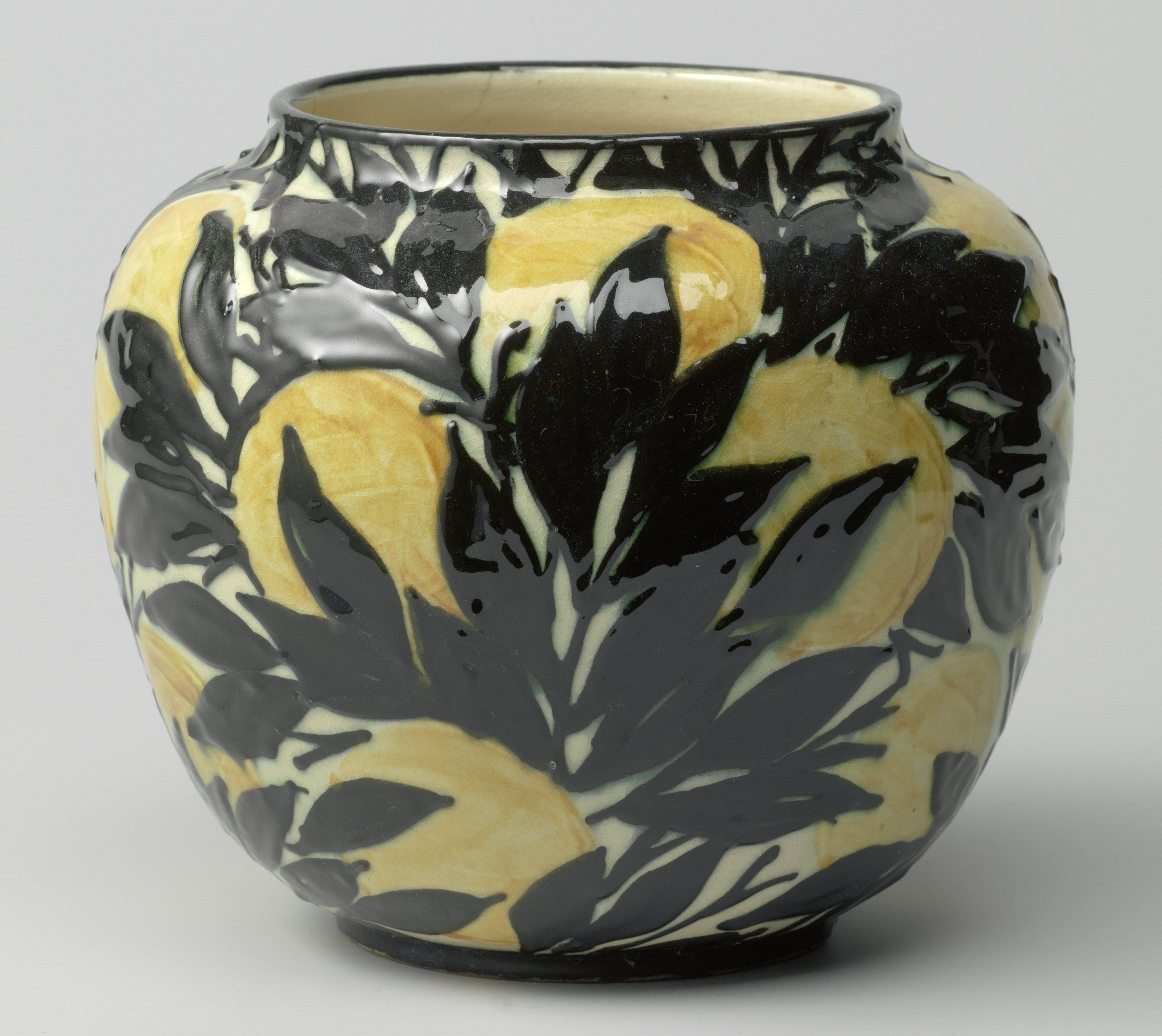 IdentificatieTitel(s): Pot van aardewerk, versierd in reliëf met gele citroenen en zwarte bladeren op een geelwitte fondObjecttype: pot Objectnummer: BK-1979-13Opschriften / Merken: fabrieksmerkinscriptie, gestempeld: ‘18 03 // Prof. Läuger // Baden // DL HV’Omschrijving: Pot van aardewerk, bol van vorm, versierd in reliëf, in slibTechniek: , met gele citroenen en zwarte bladeren op geelwitte fond.VervaardigingVervaardiger: vervaardiger: Groszherzogliche Majolika-Manufakturontwerper: Max LaeugerPlaats vervaardiging: KarlsruheDatering: ca. 1921 - ca. 1925Fysieke kenmerken: aardewerkMateriaal: aardewerk TechniekslibtechniekAfmetingen: h 16,0 cm. × d 18,6 cm. Verwerving en rechtenVerwerving: aankoop 1979Copyright: Publiek domein